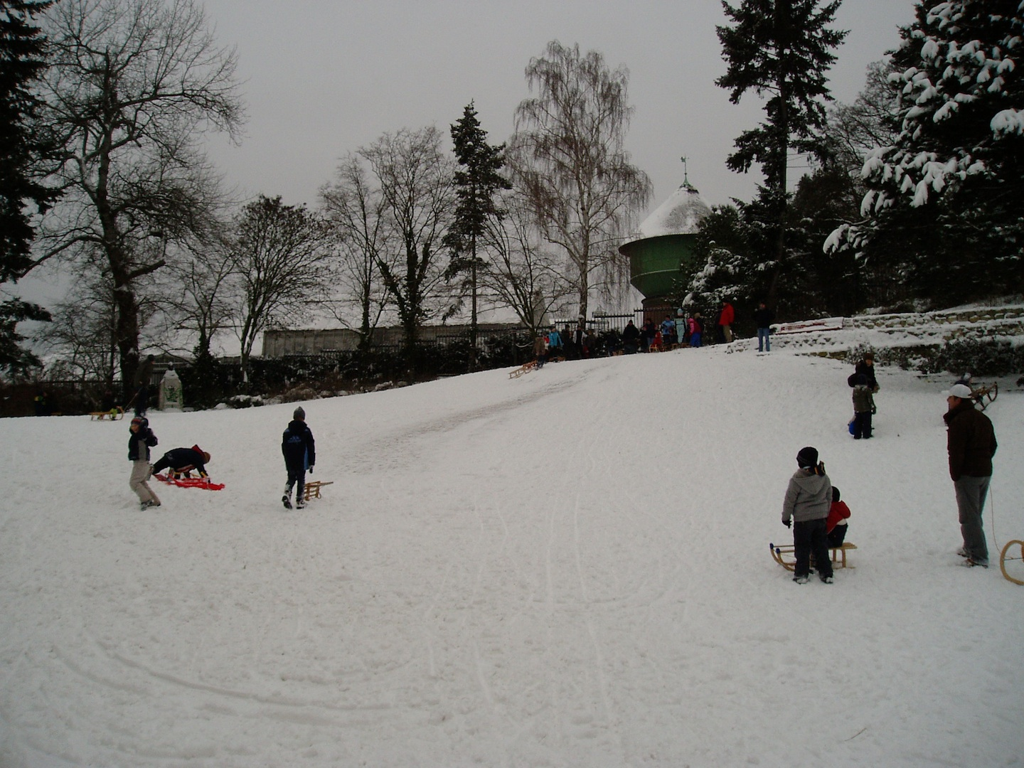 Fichtenberg Berlin-Steglitz, Rodeln im Winter